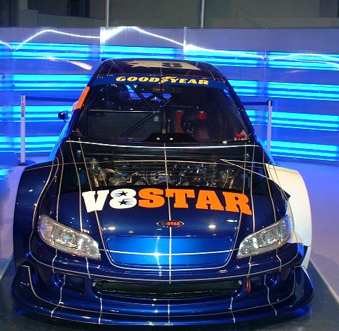 V8-Star Essen Motorshow 2001